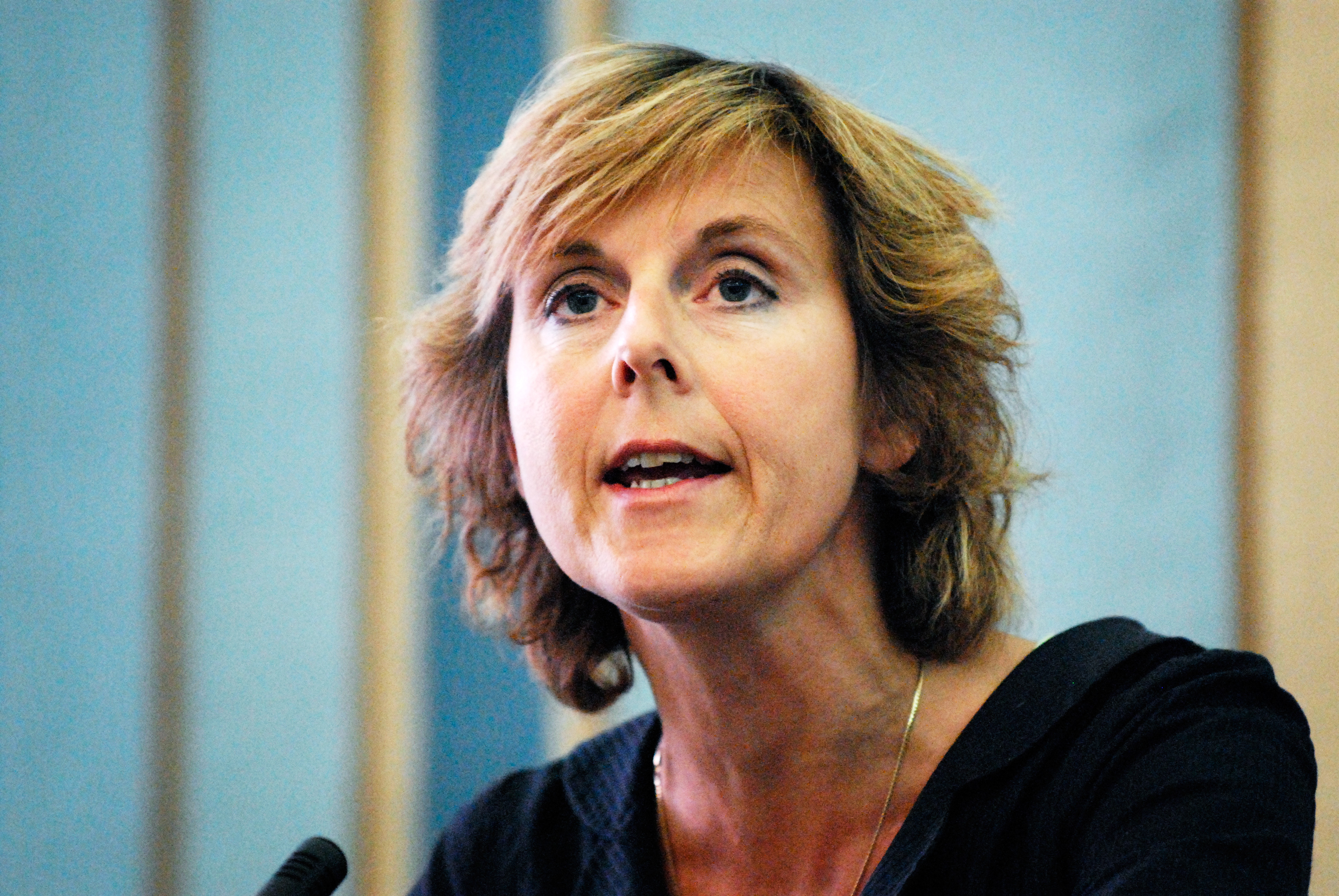 Connie Hedegaard, miljö- och samarbetsminister Danmark, under Nordiska rådets session i Köpenhamn 2006.